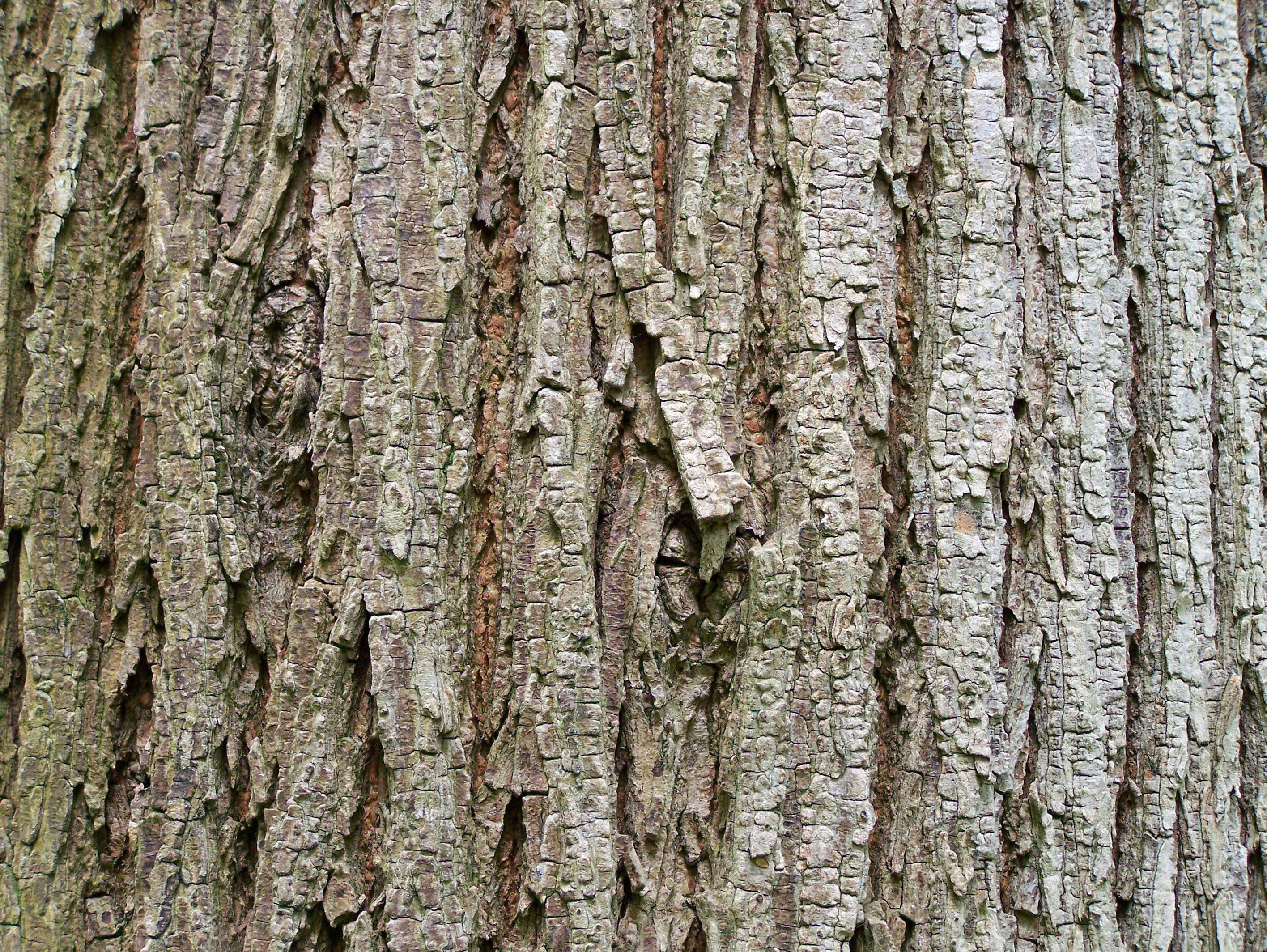 Species: Ulmus glabra